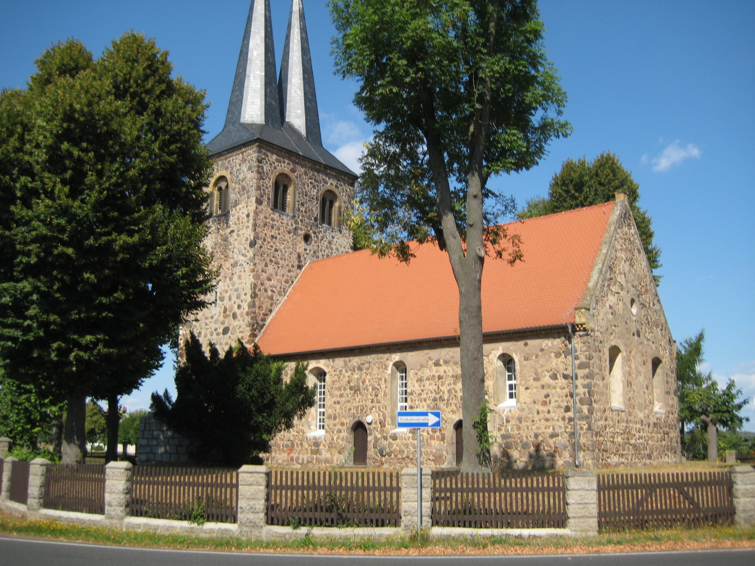 Dorfkirche Ihlow - Deutschland